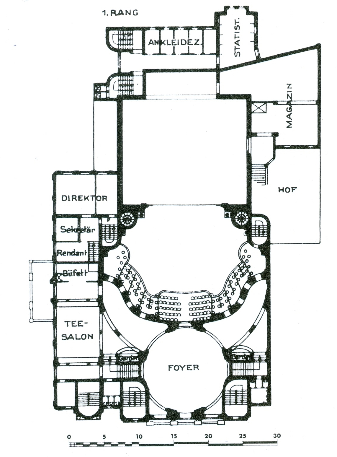 Düsseldorf, Schauspielhaus an der Karl-Theodor-Straße, erbaut von Sehring 1905, Grundriss